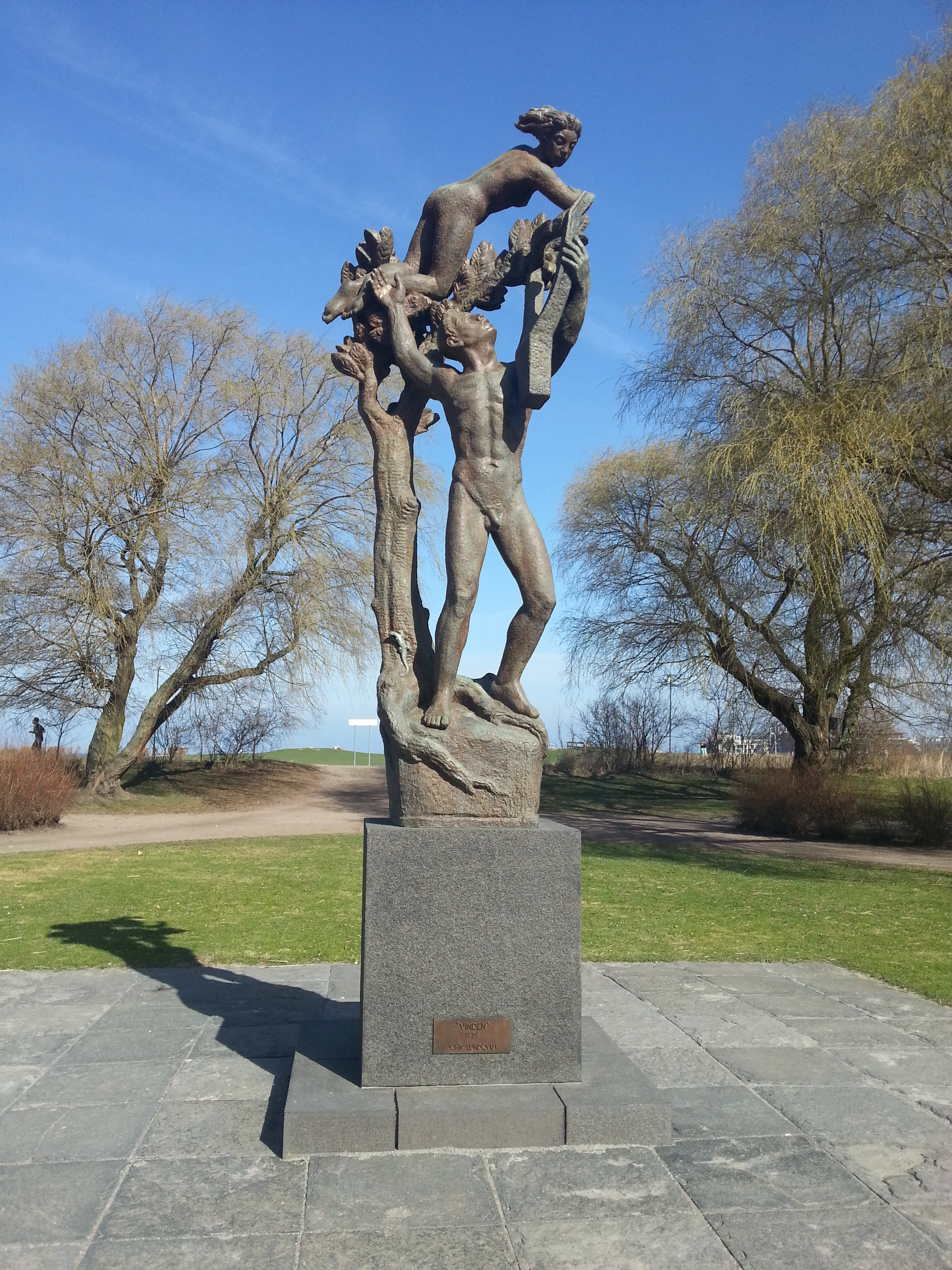 Vinden (1959) - John Lundkvist This reproduction of an architectural work or work of art, is covered under the Swedish law of copyright for literary and artistic works (Law 1960:729, paragraph 24), which states that "Work of art may be depicted if it is permanently placed on or at a public place outdoors. Buildings may be freely depicted." See Commons:Freedom of panorama#Sweden for more information.